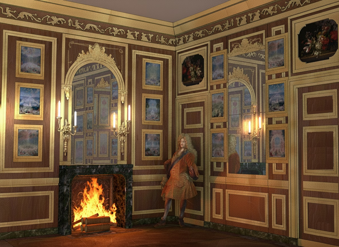 Essai de restitution du cabinet du "Petit appartement frais", vers 1703-1711.